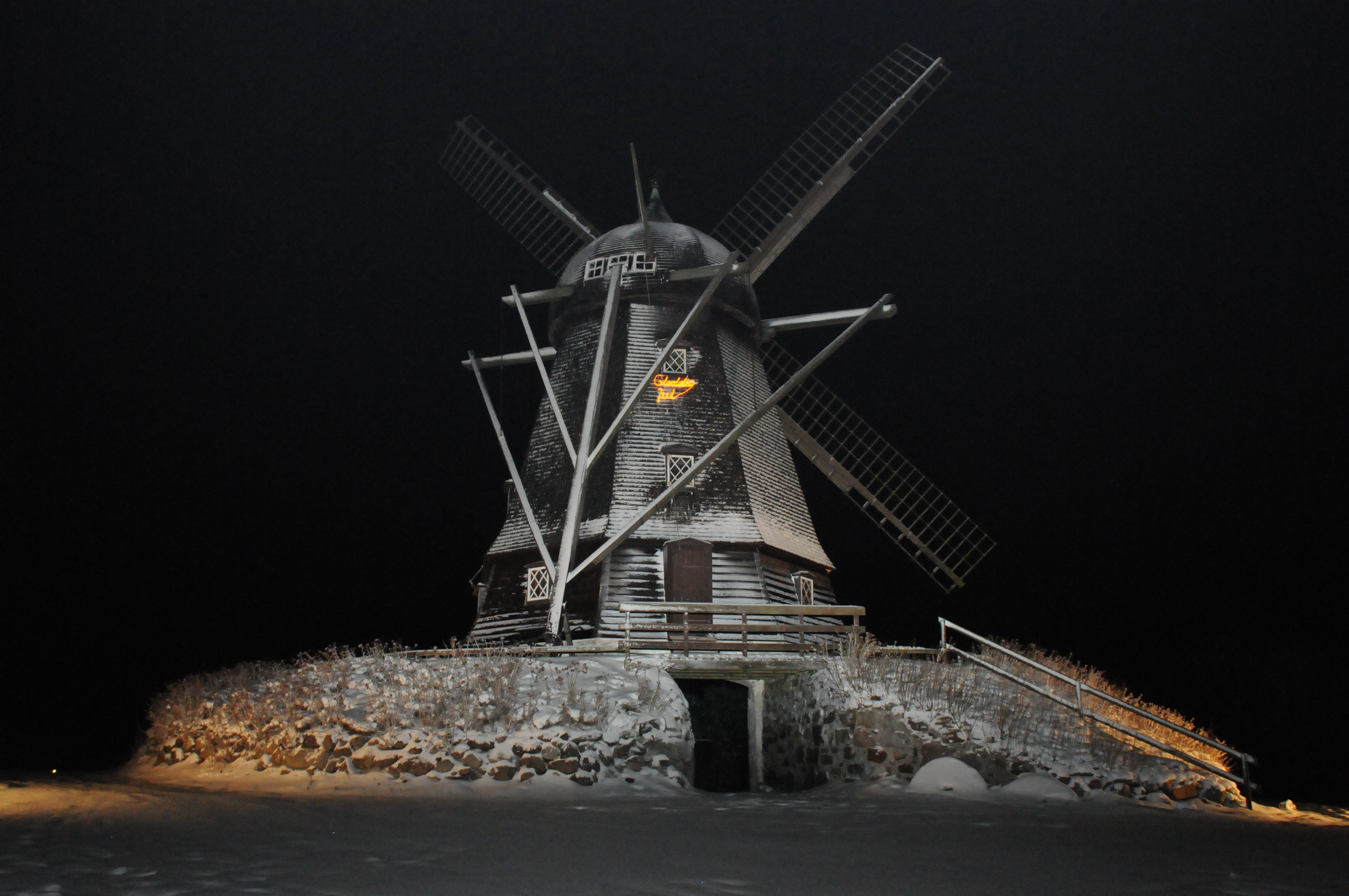 Jægerspris Mølle indhyllet i sne